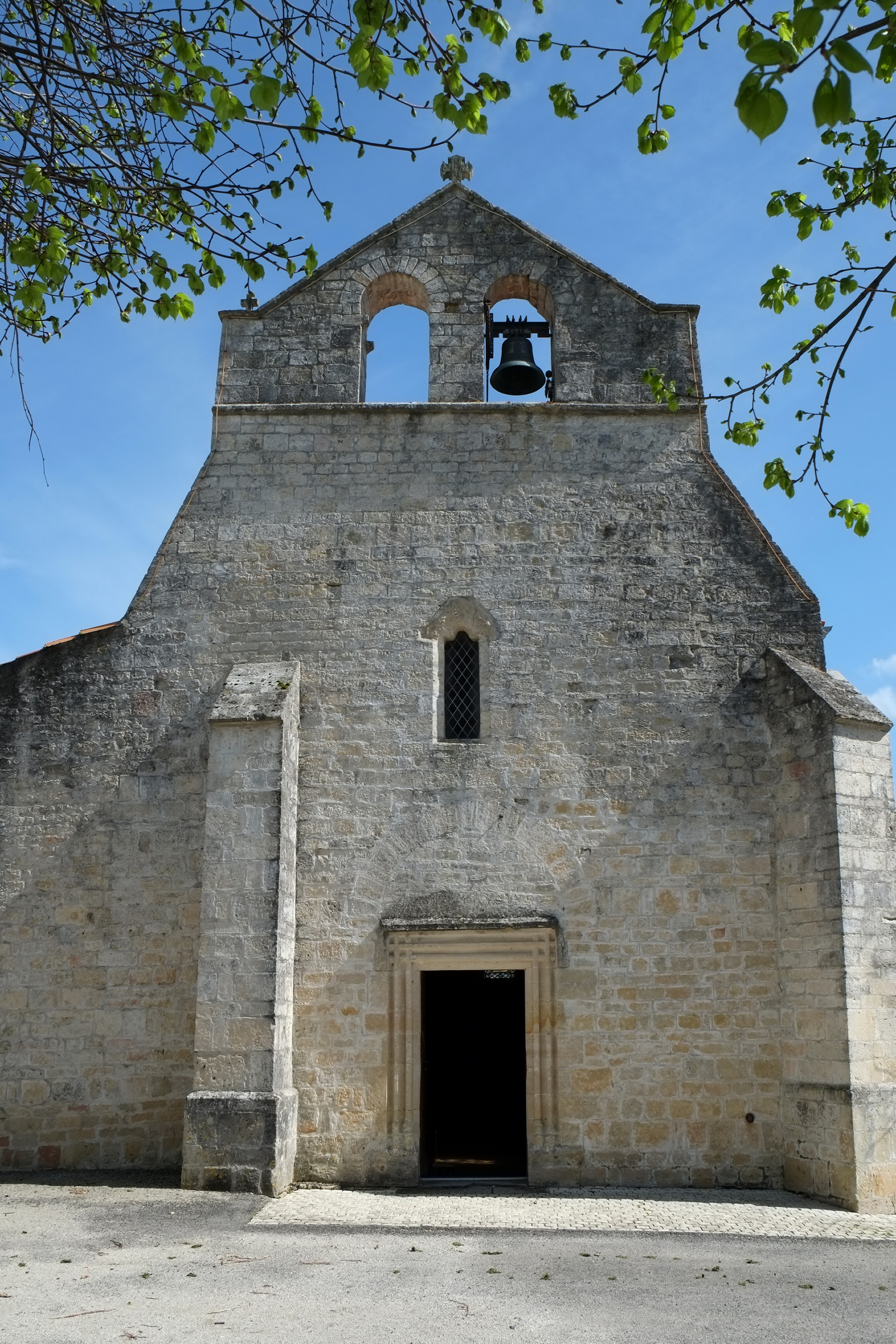 Église Saint-Pierre Le Thou Charente-Maritime France